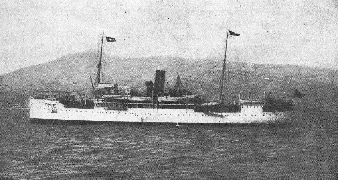 Vapor Santa Isabel nas rías galegas, fotografía en Vida Gallega 1921